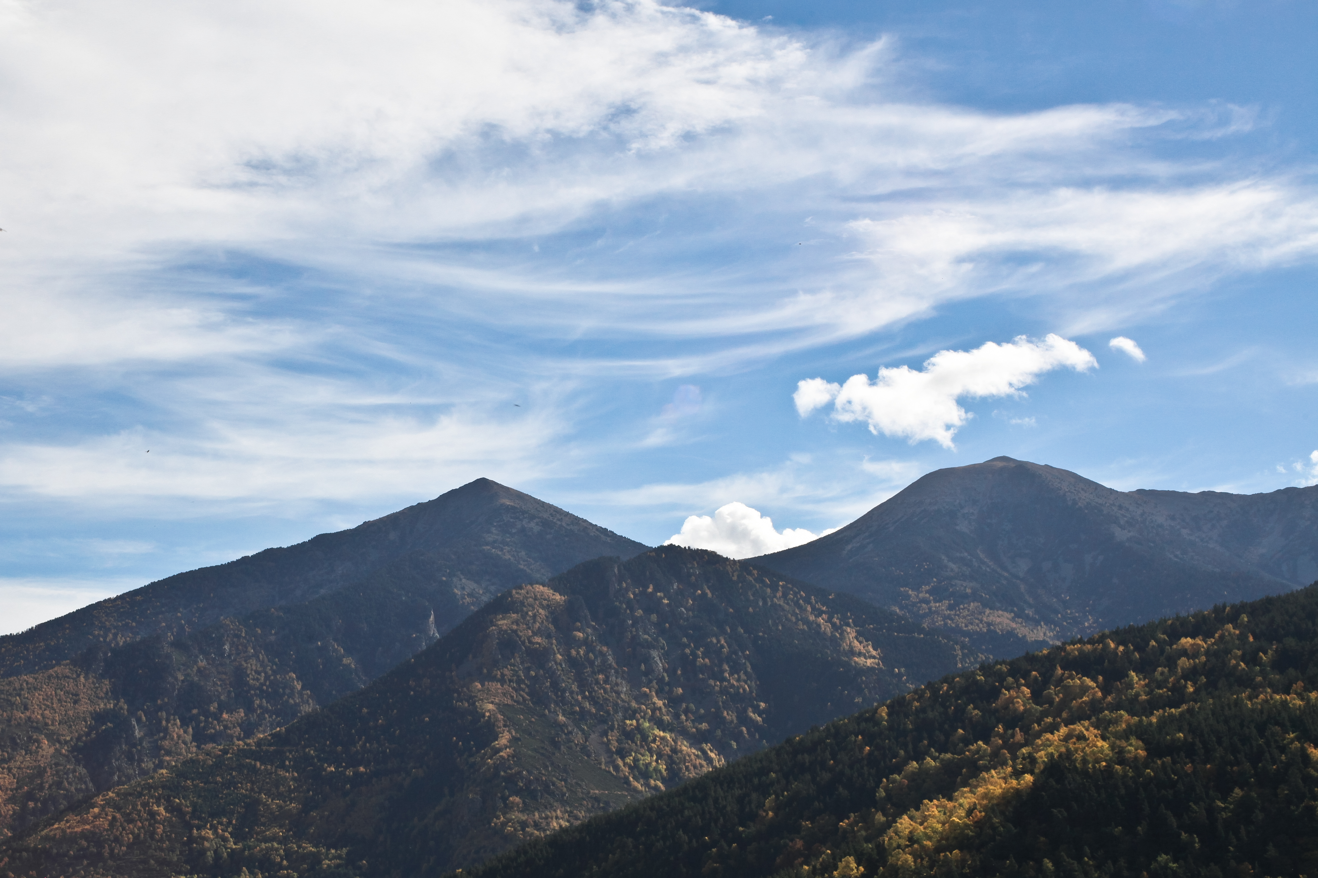 PNR des Pyrénées catalanes, autour de Mont-Louis. À gauche le pic de Gallinas 2624m et à droite le pic Redoun 2672m. Octobre